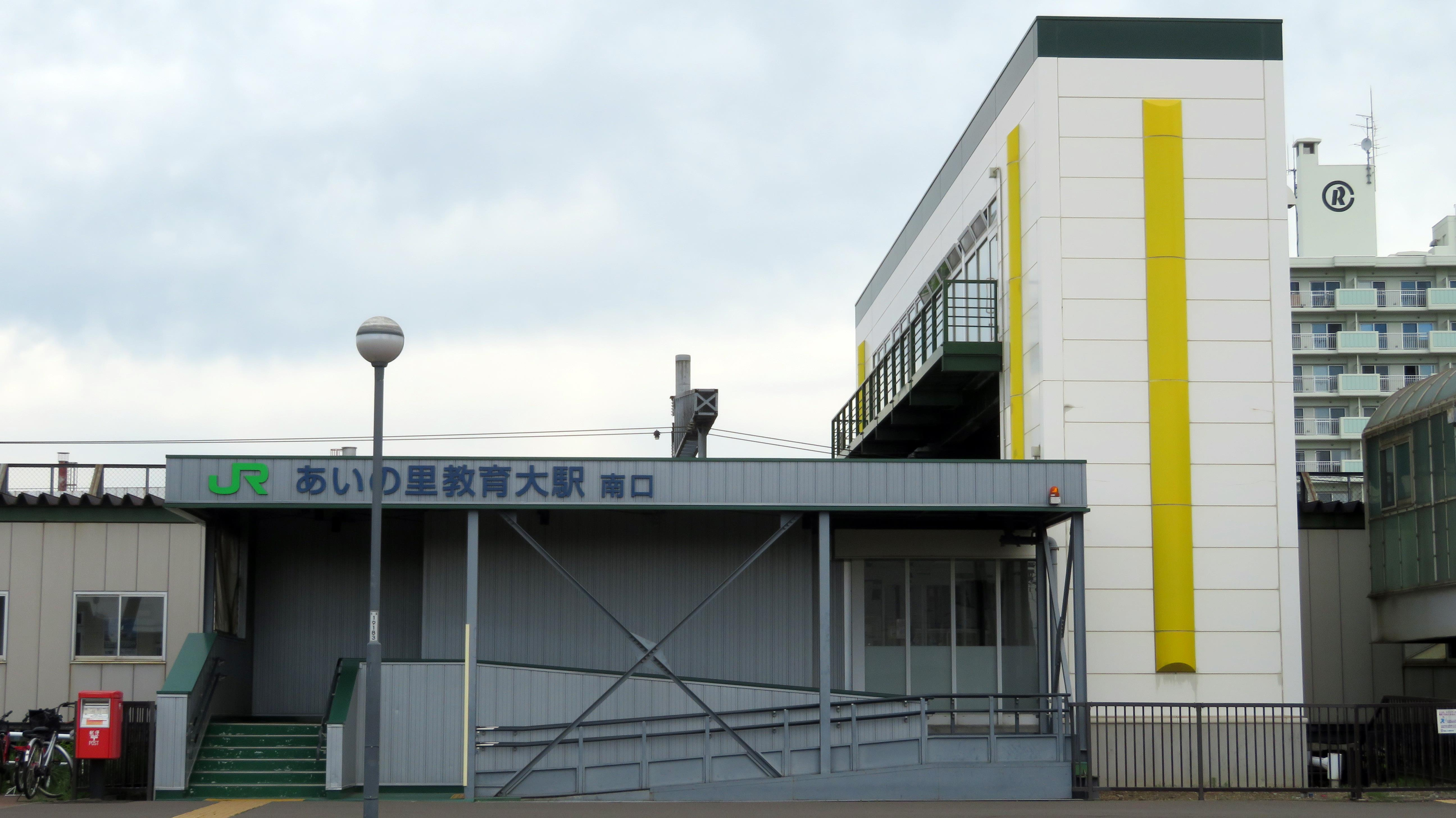 あいの里教育大駅南口